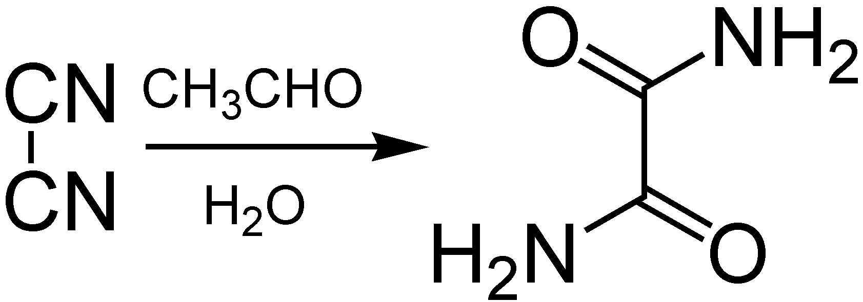 Libigsche Oxamid-Synthese